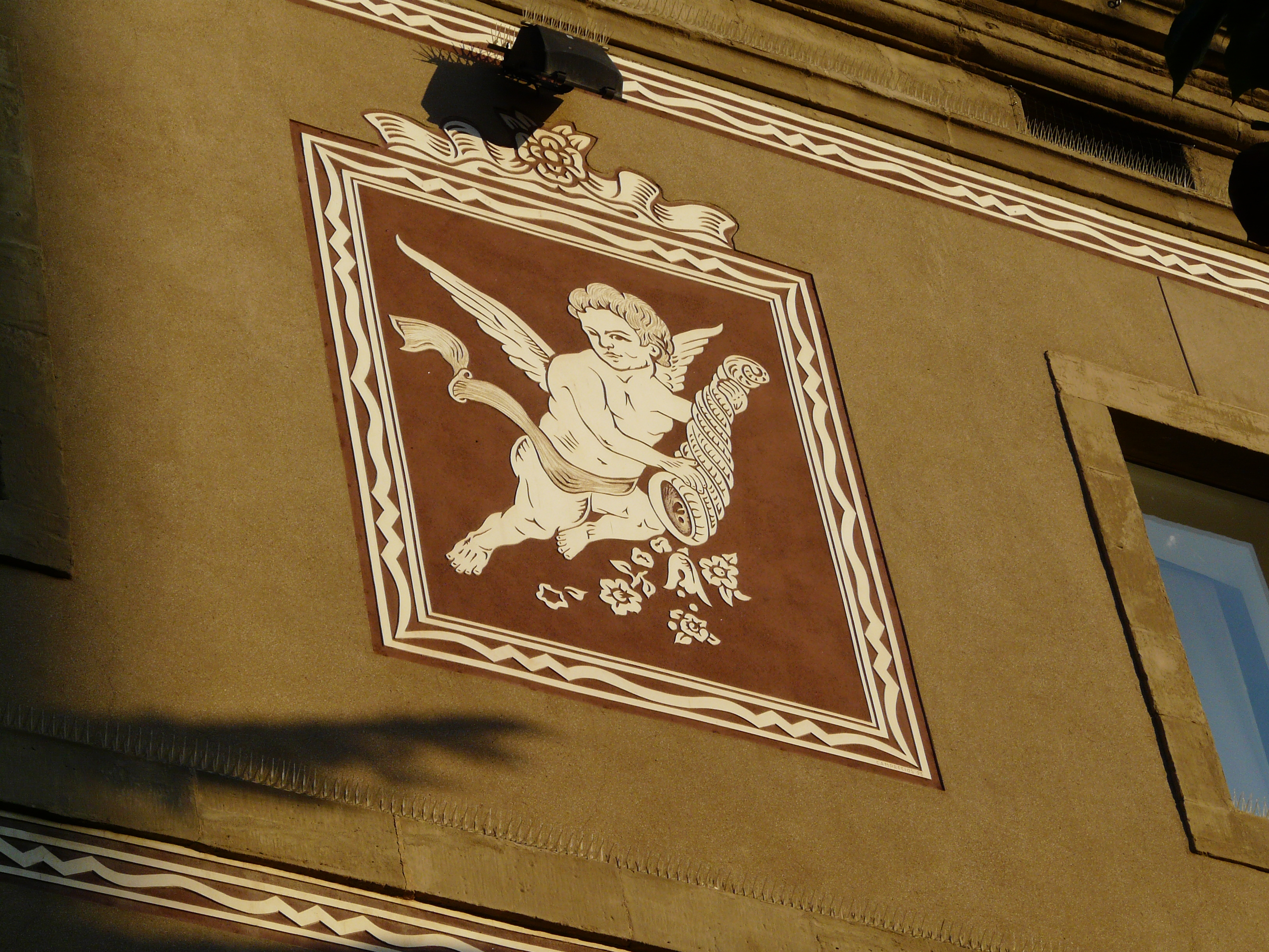 Casa Maternitat (Lleida) Object location41° 36′ 48.64″ N, 0° 37′ 12.68″ E